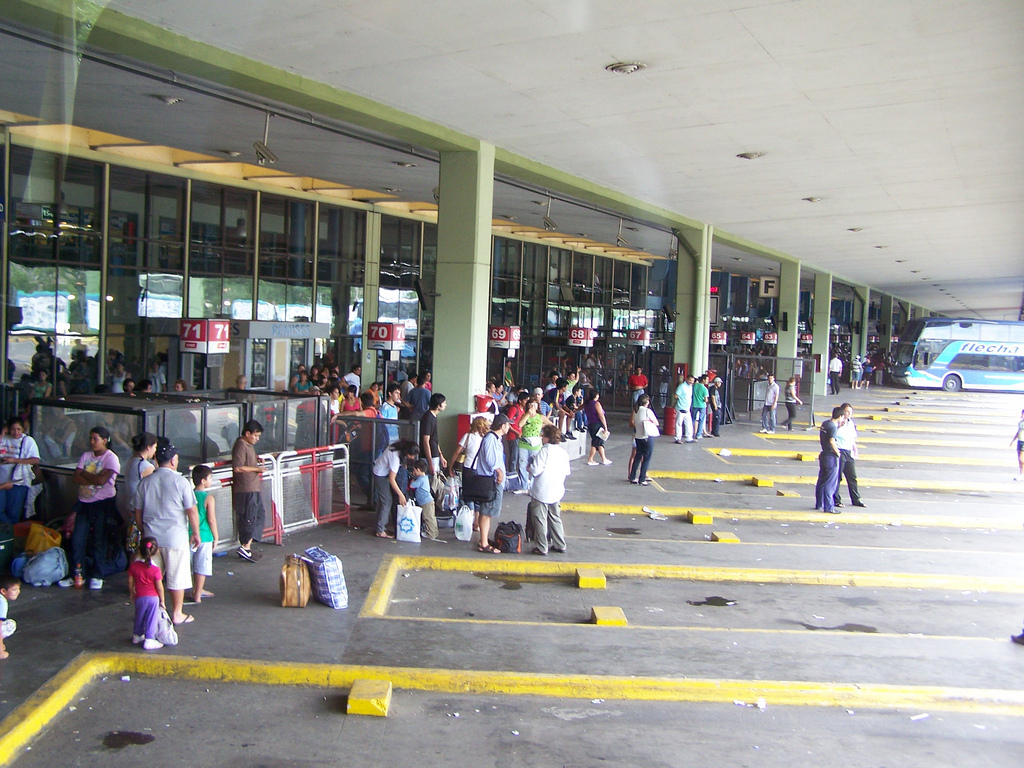 Terminal de ómnibus de Retiro, Buenos Aires